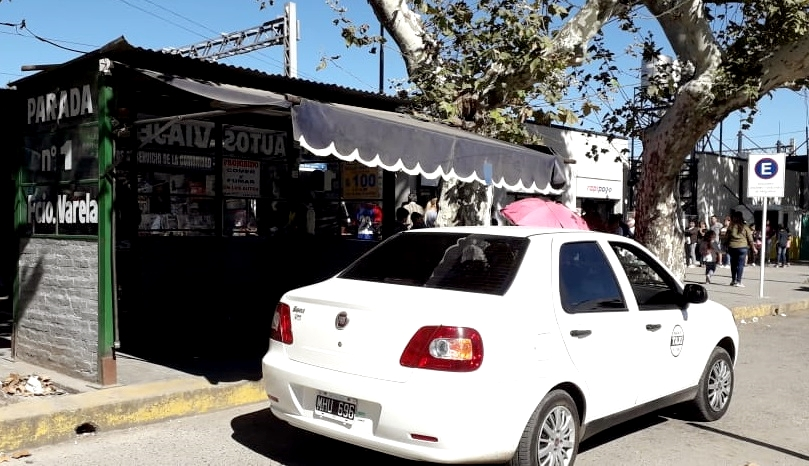 Taxi de Fcio. Varela